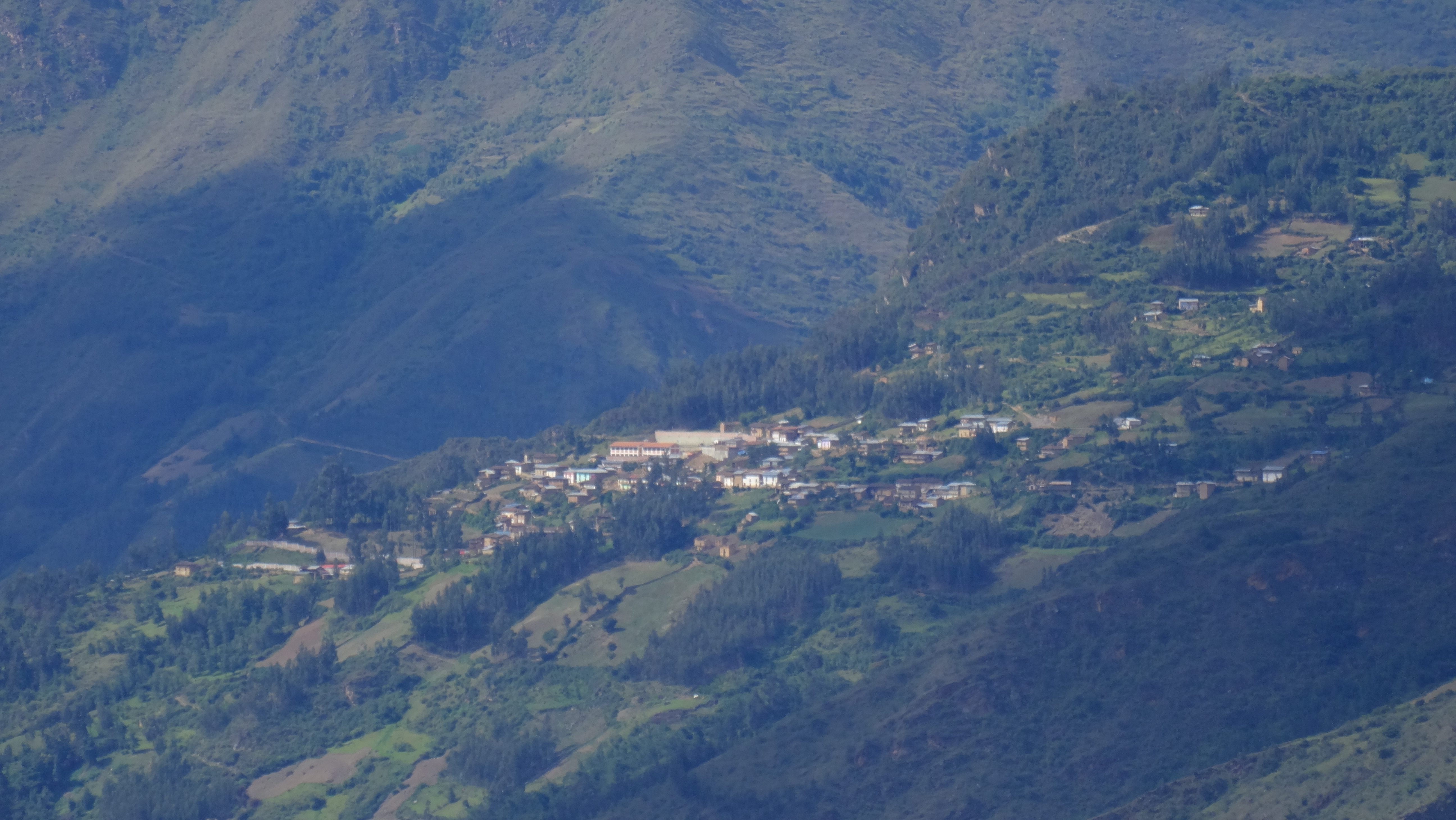 Distrito de Arancay visto desde el perimetro noreste de Jircán.